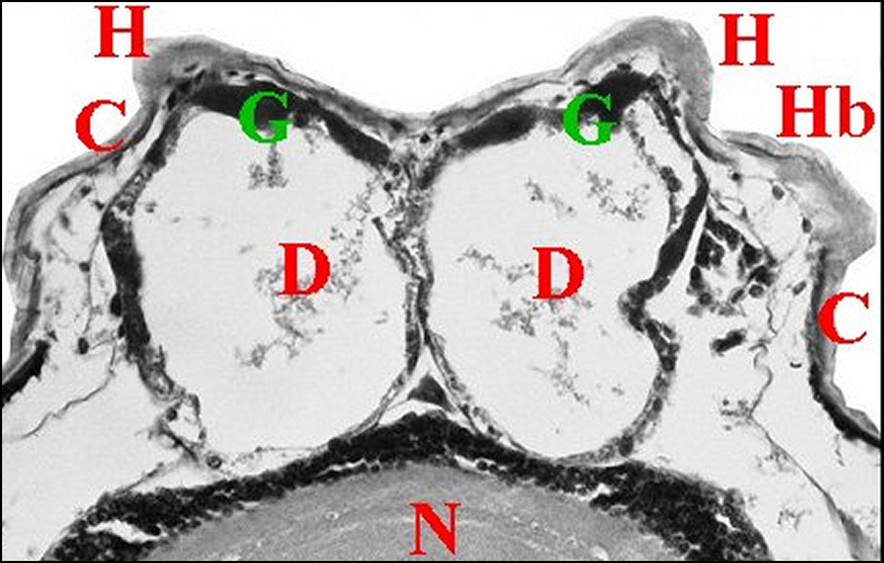 Mastophora cornigera, femelle immature : coupe histologique transversale du prosoma passant par les cornes